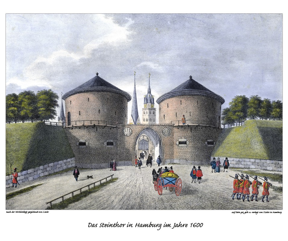 Hamburg um 1600, Steintor.